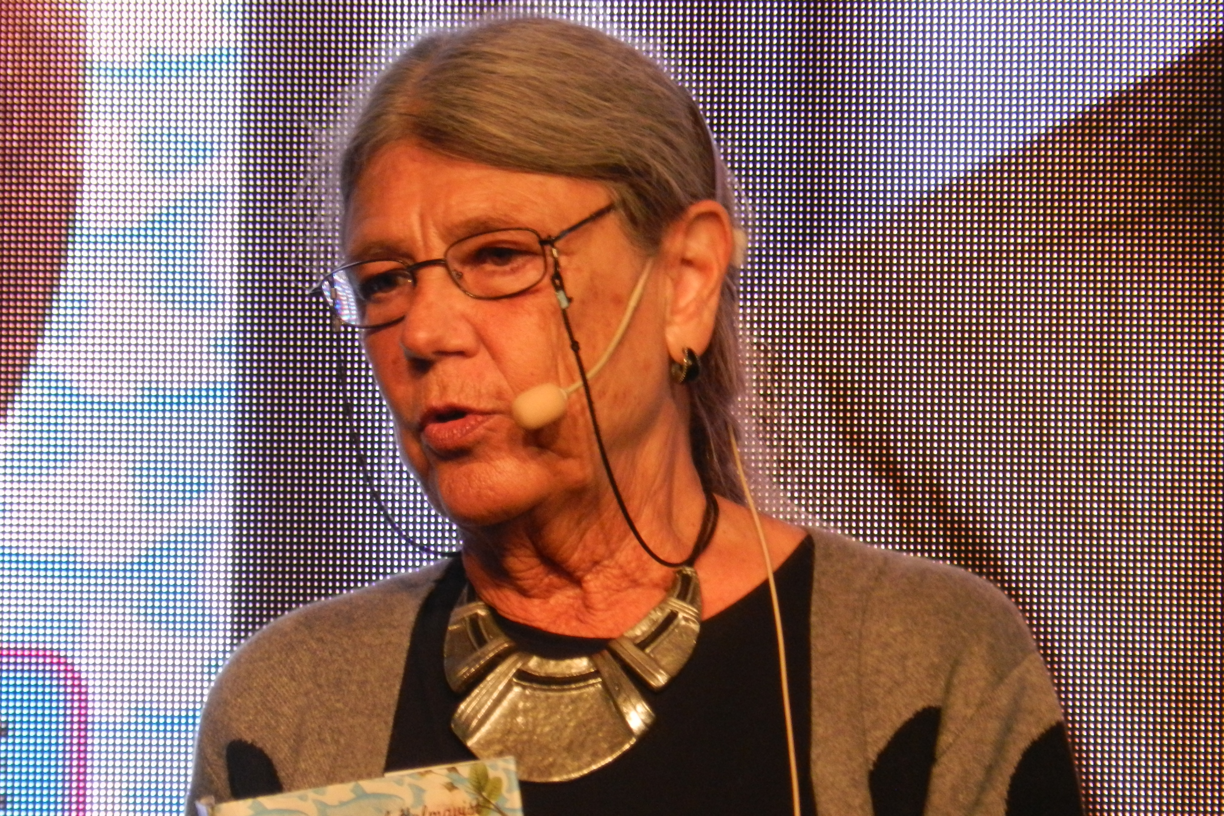 Karin Brunk Holmqvist på Bokmässan i Göteborg 2017.